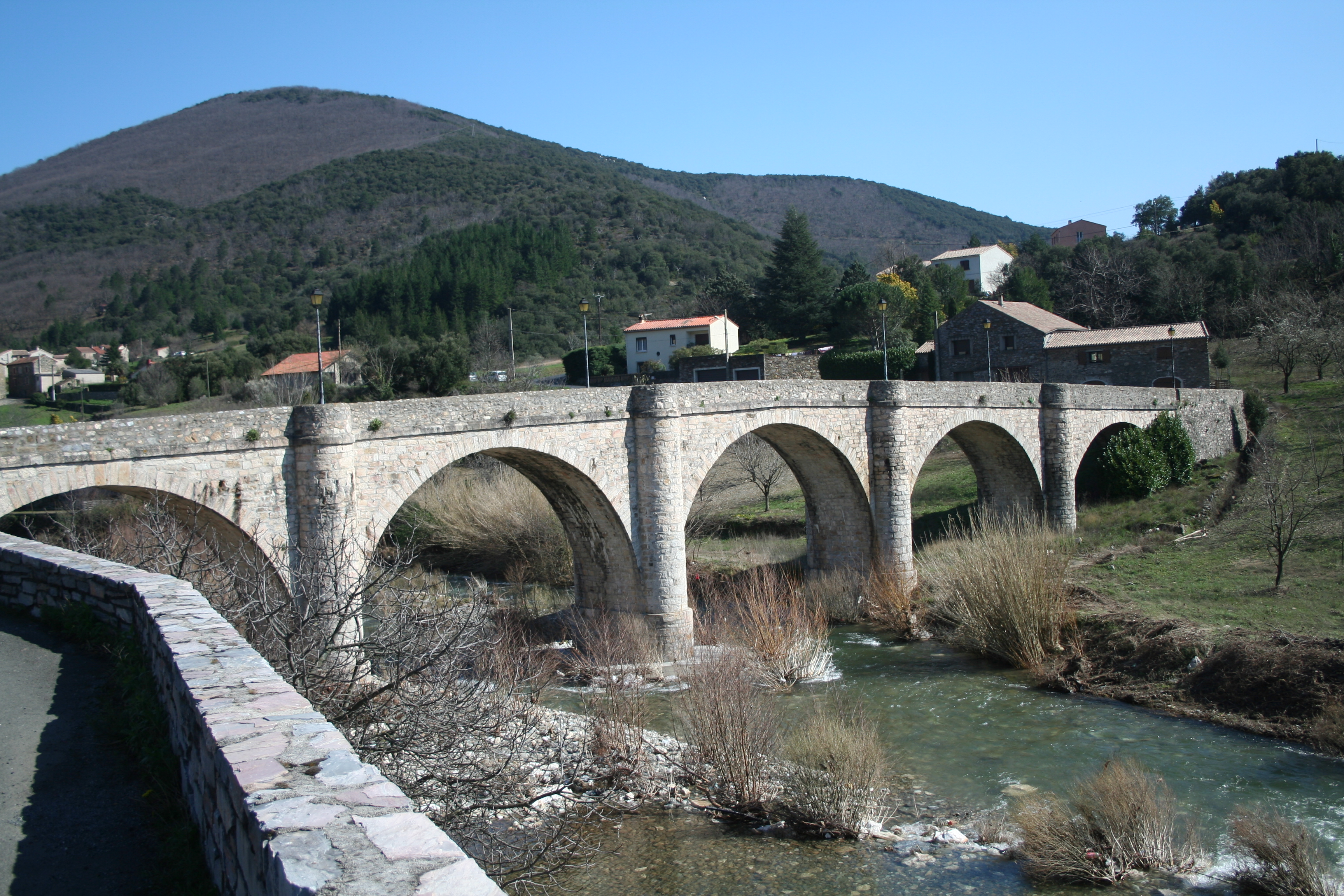 Saint-Étienne-d'Albagnan (Hérault) - pont sur le Jaur.